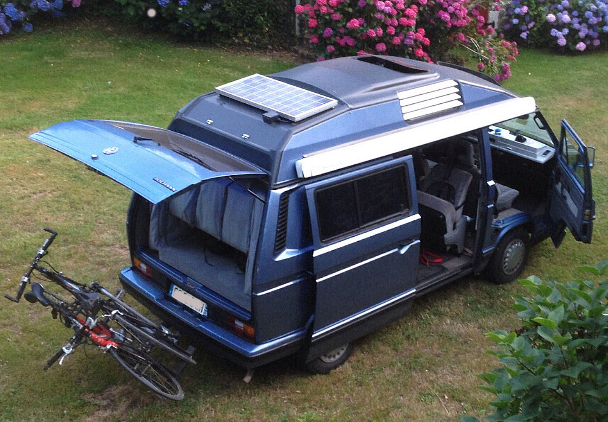 VOLKSWAGEN Transporter Delher T3 Blue star